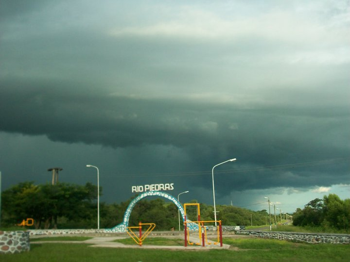 Entrada a Río Piedras, Metan Salta - República Argentina